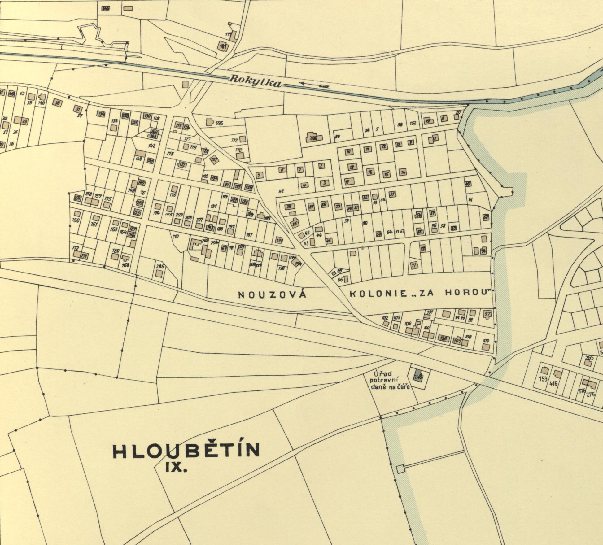 Hloubětín, nouzová kolonie "Za horou" v roce 1938, výřez z mapového listu č.42, Orientační plán hlavního města Prahy s okolím (1938), nákladem Obce pražské, provedl stavební úřad hl. m. Prahy.